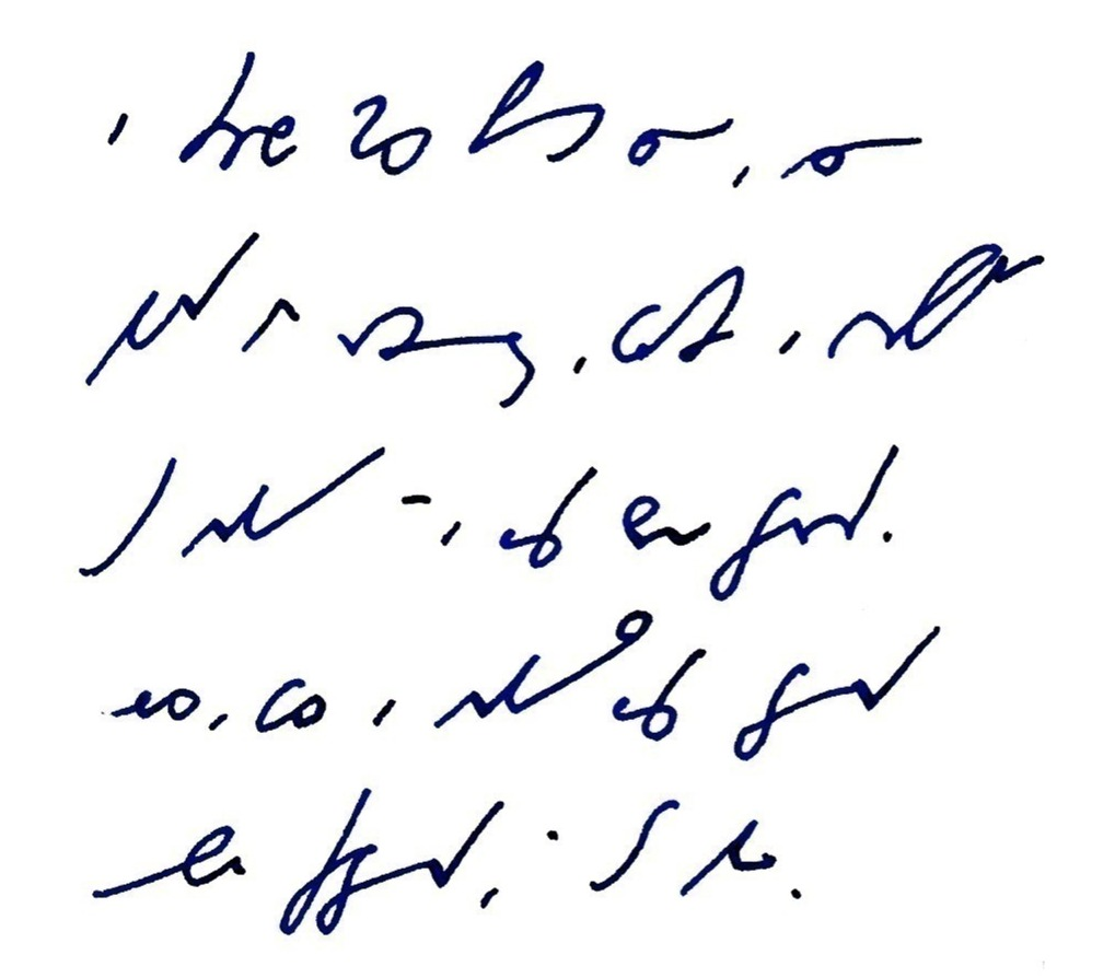 Stenografische Notiz eines Kolping-Zitats in Deutscher Einheitskurzschrift (Verkehrsschrift nach der Wiener Urkunde)